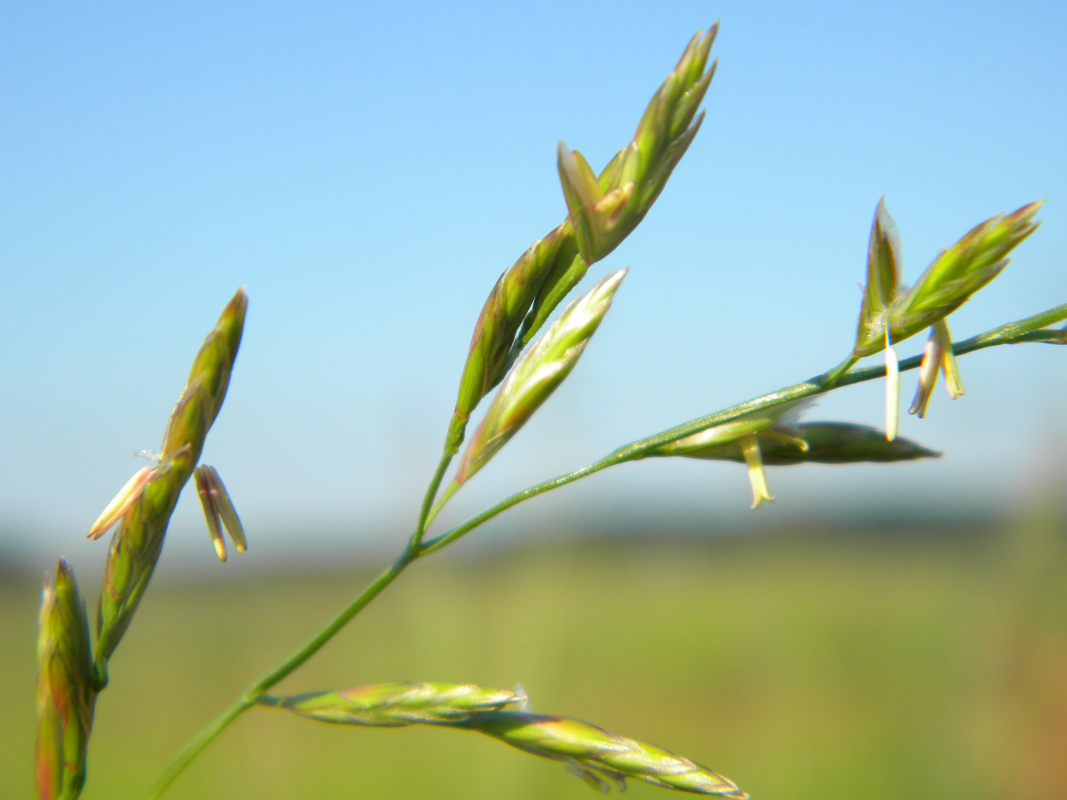 Schedonorus pratensis